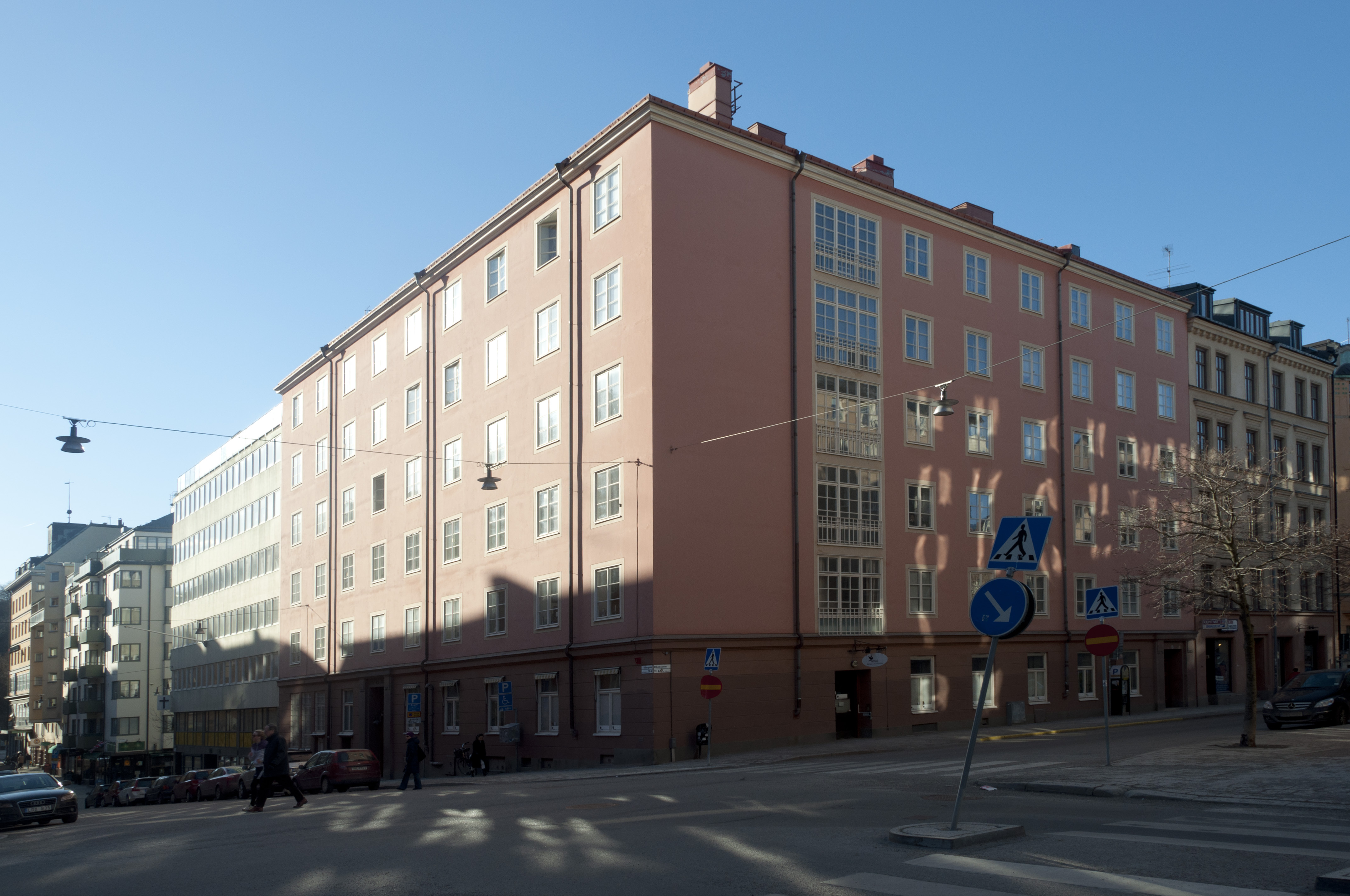 Gustav Vasagården, kv. Stolmakaren 3, 4, 5 Rehnsgatan 16, Döbelnsgatan 61. Byggnadsår 1929-30, arkitekt Gustaf Sällström, byggherre Gustav Vasagården, byggmästare A Olsson.